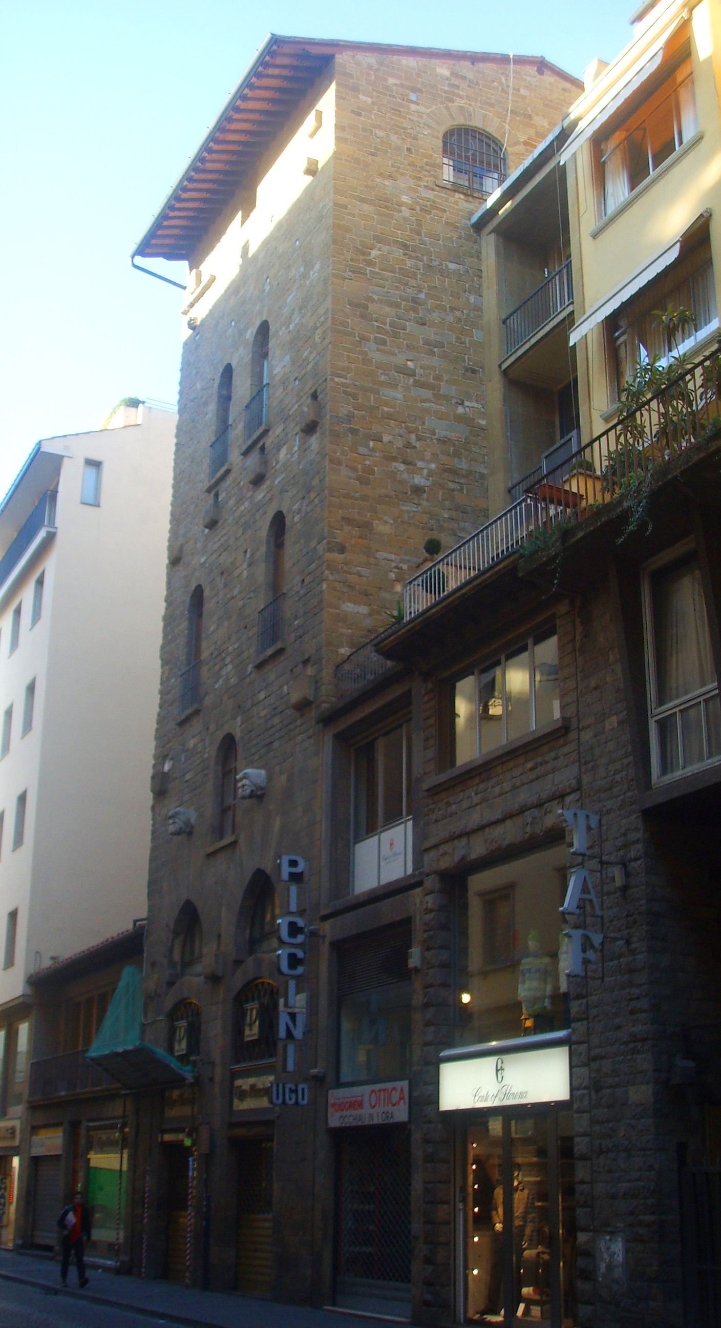 torre degli amidei in Florence, italy